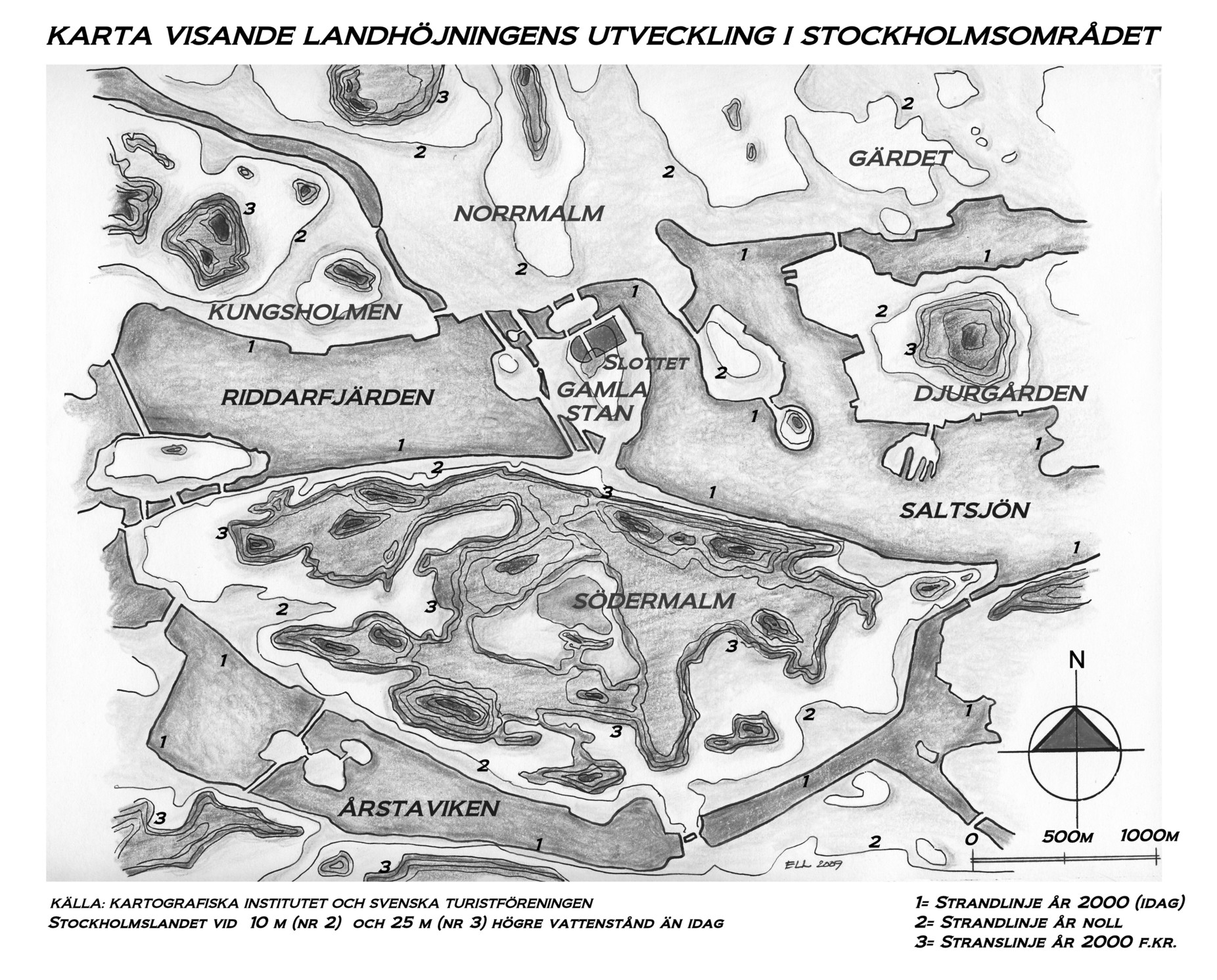 Rekonstruktion av stockholmsområdets strandlinjer enligt Gerard De Geer. Mörka partier (3) = 2000 år f.Kr. Vita partier (2) = omkring Kristi födelse Gråa partier (1) = idag